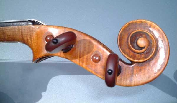 Violin scroll